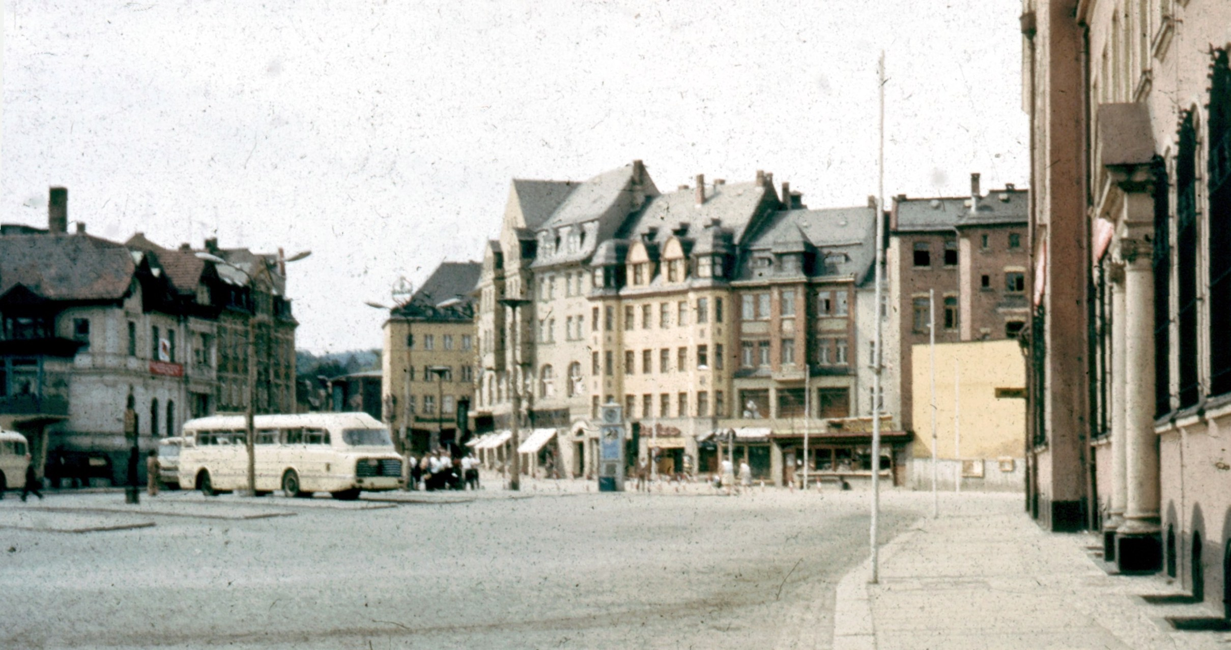 Postplatz circa 1962; scan vom Dia; rechte Seite: Postgebäude